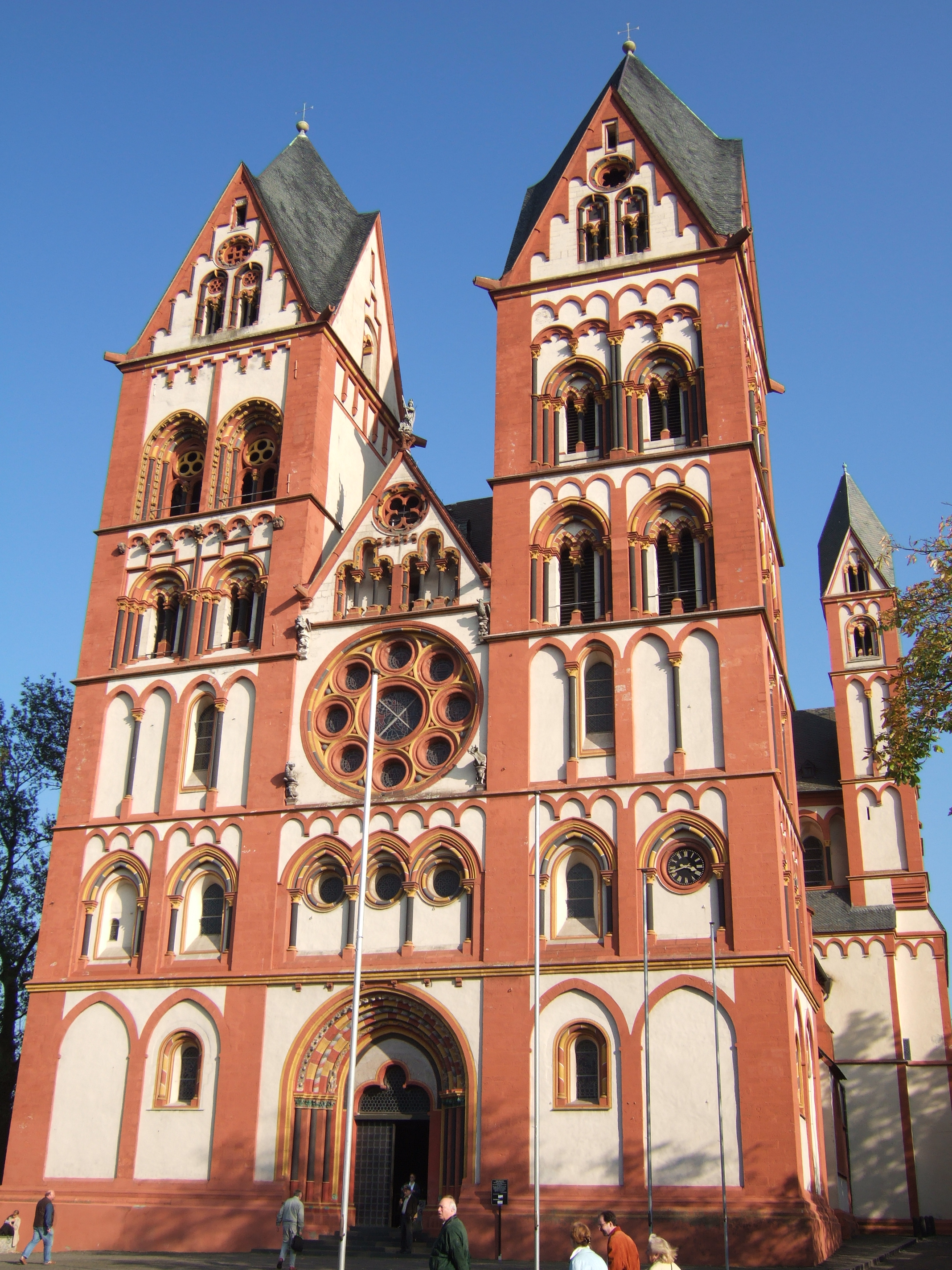 Dom in Limburg an der Lahn (Frontansicht)